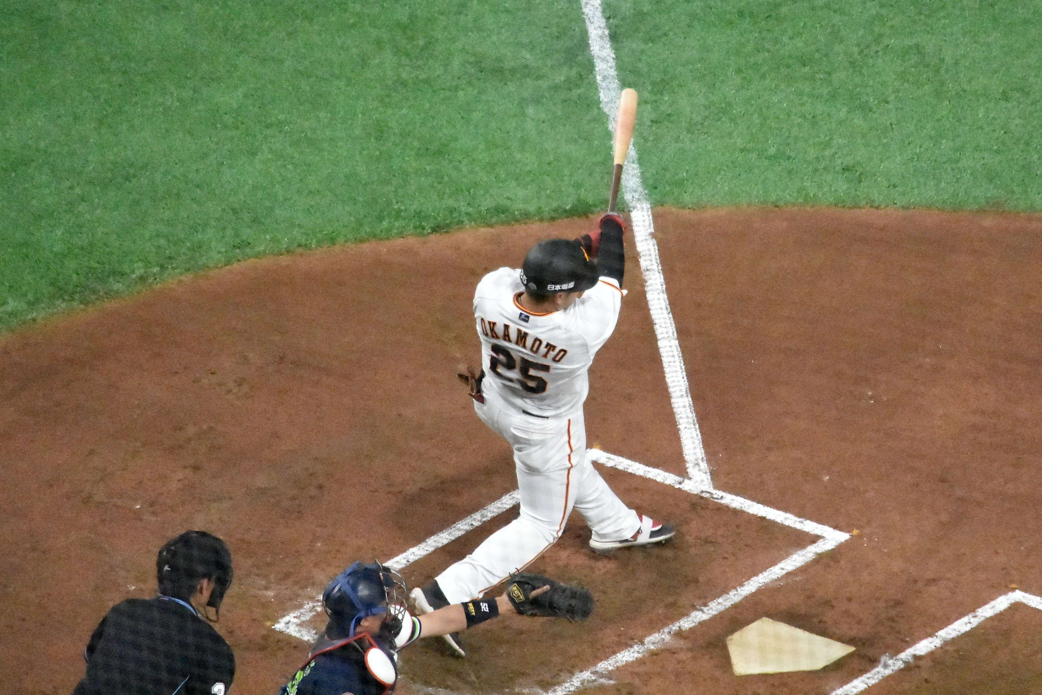 読売巨人軍 岡本和真 Nikon D3400